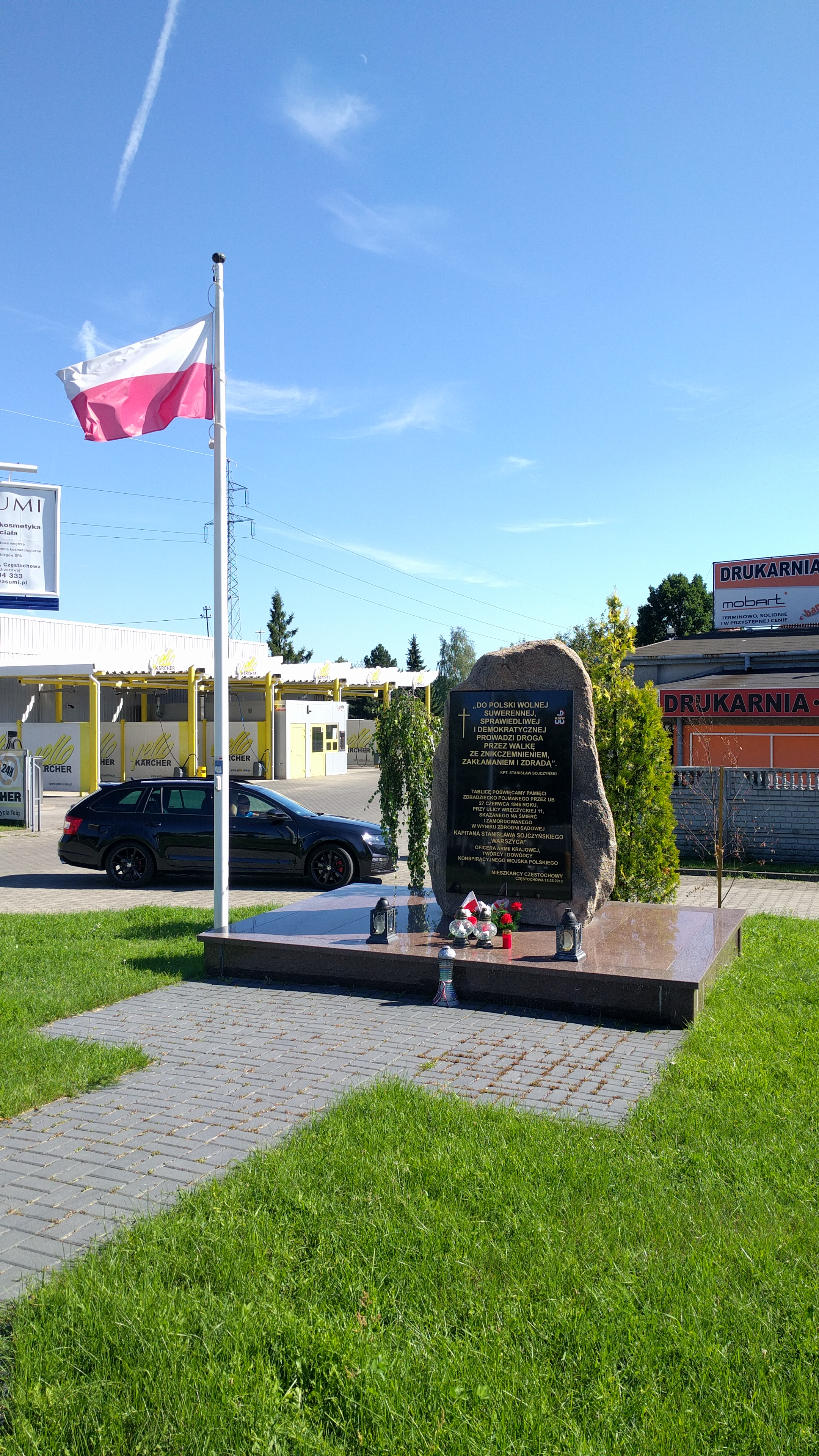 gen. bryg. S. Sojczyński „Warszyc""